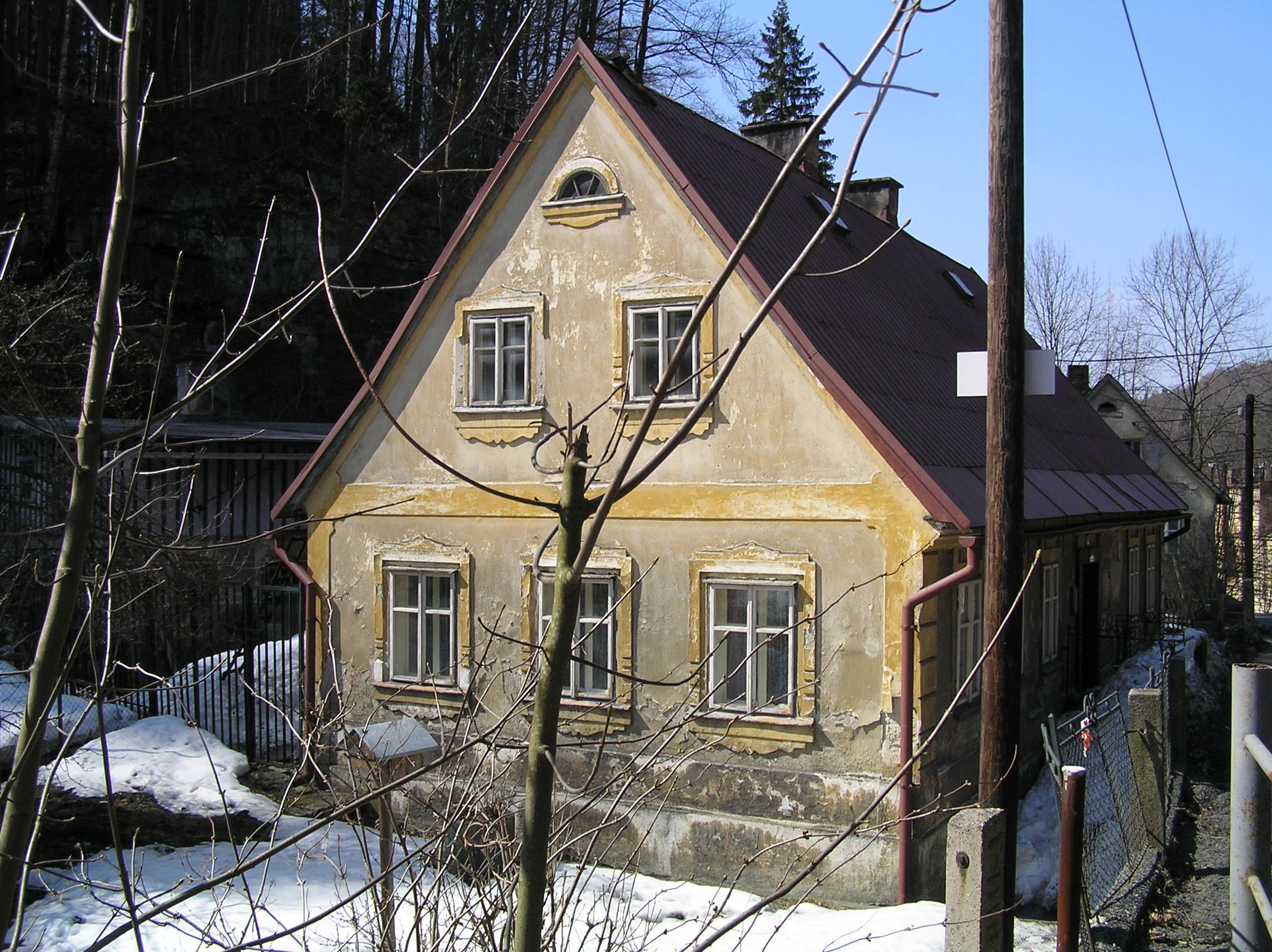 Lidová architektura v osadě Lukášov (Luxdorf) u Jablonce nad Nisou - chalupa v ul. Pod Vodárnou 65/21 (dnes necitlivě upravena, hospodářské objekty zbořeny)